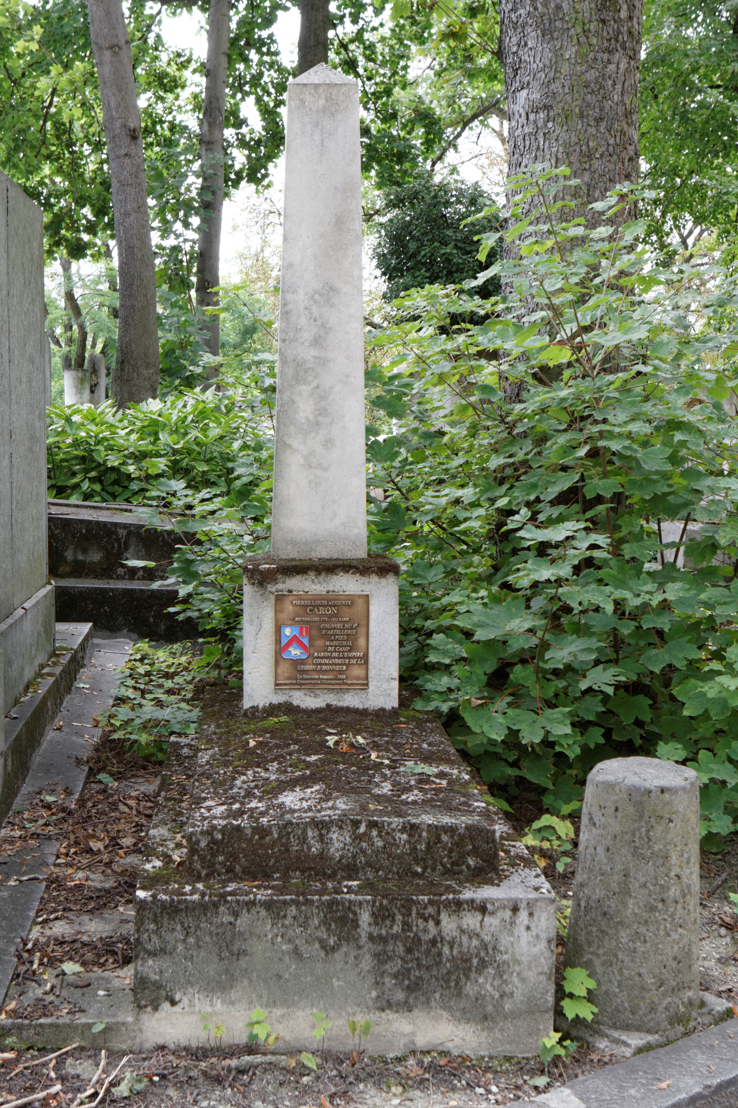 Obélisque du général d'artillerie Pierre-Louis-Auguste Caron (1774-1832).